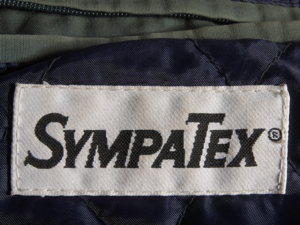 Textiletikett an einer Jacke mit Funktionsmembran von SympaTex.